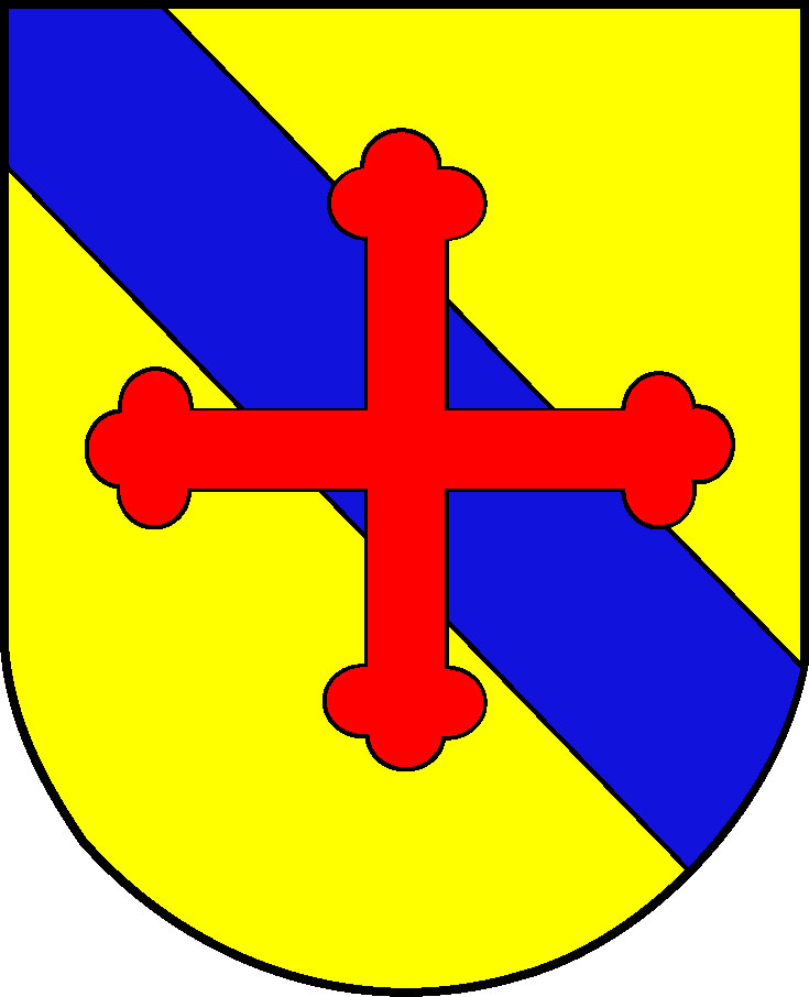 Blason de la commune de Sullens VD(CH)